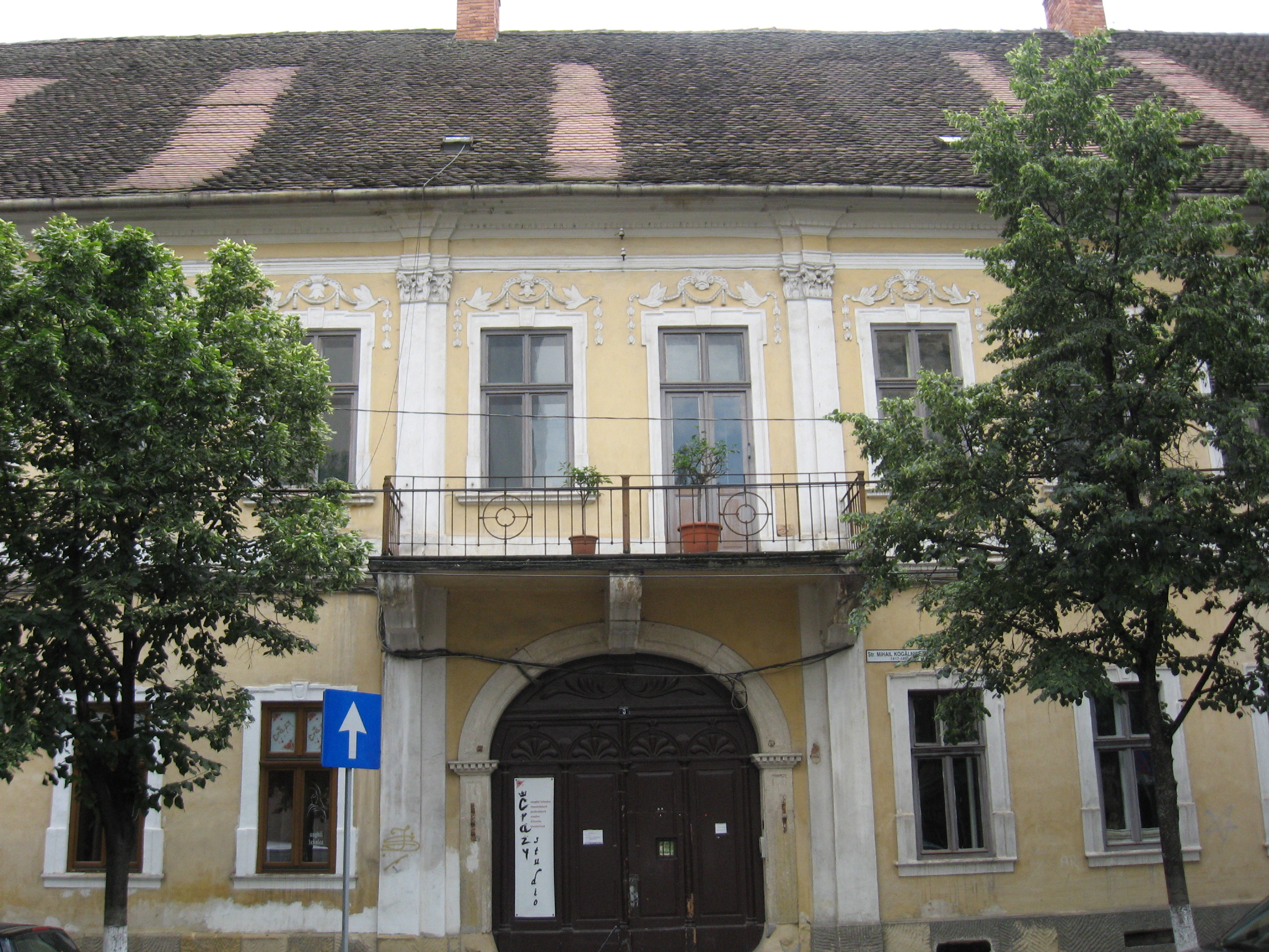 Cluj-Napoca, str. M.Kogălniceanu nr.6